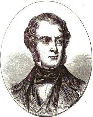 Comte Clarendon.